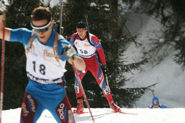 See Title